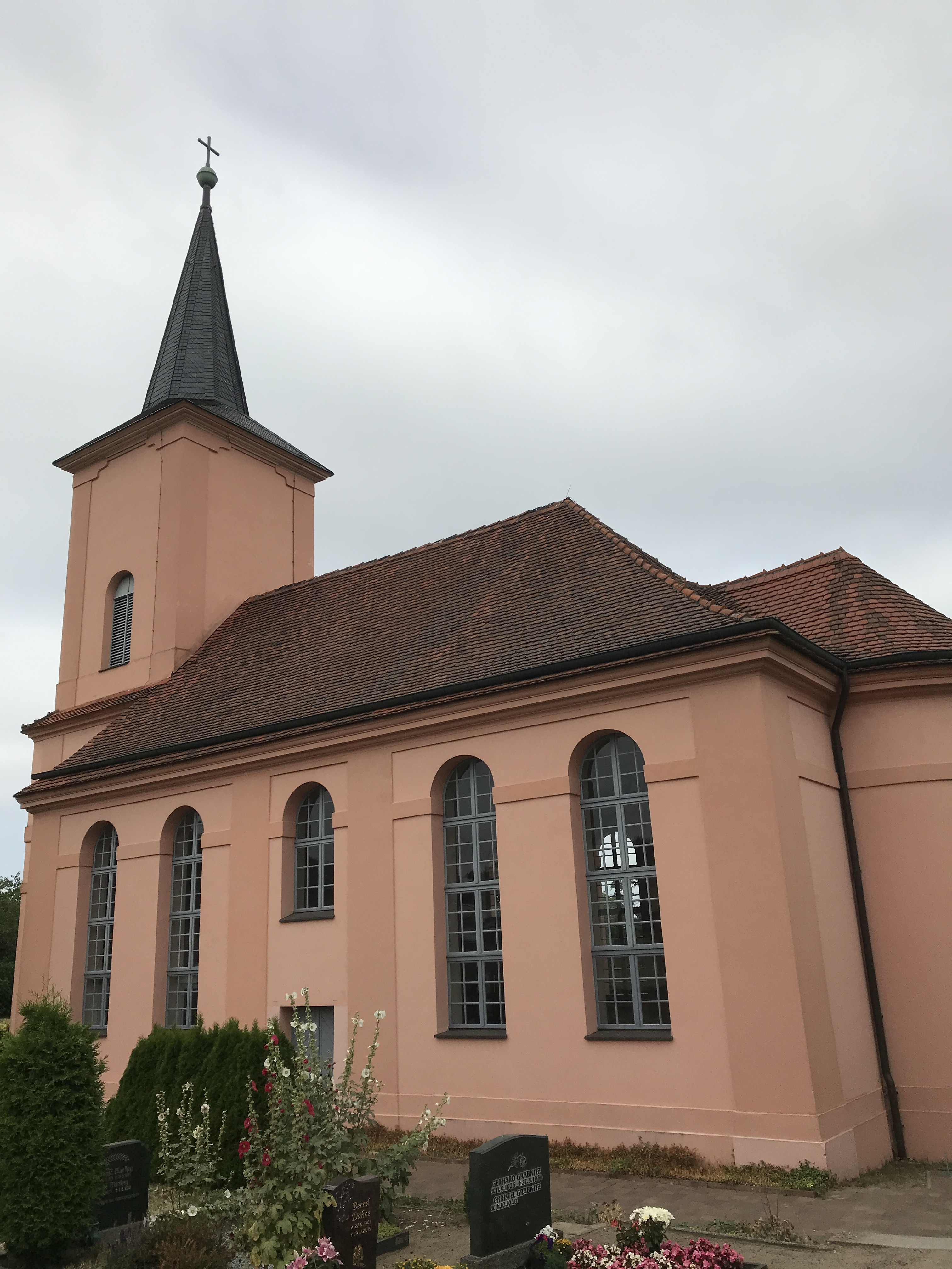 Die Dorfkirche Phöben ist eine Saalkirche aus dem Jahr 1758 in Werder (Havel). Im Innenraum stehen unter anderem eine polygonale Kanzel sowie eine Hufeisenempore.